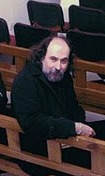 Fotografía de Francesc Calvelt